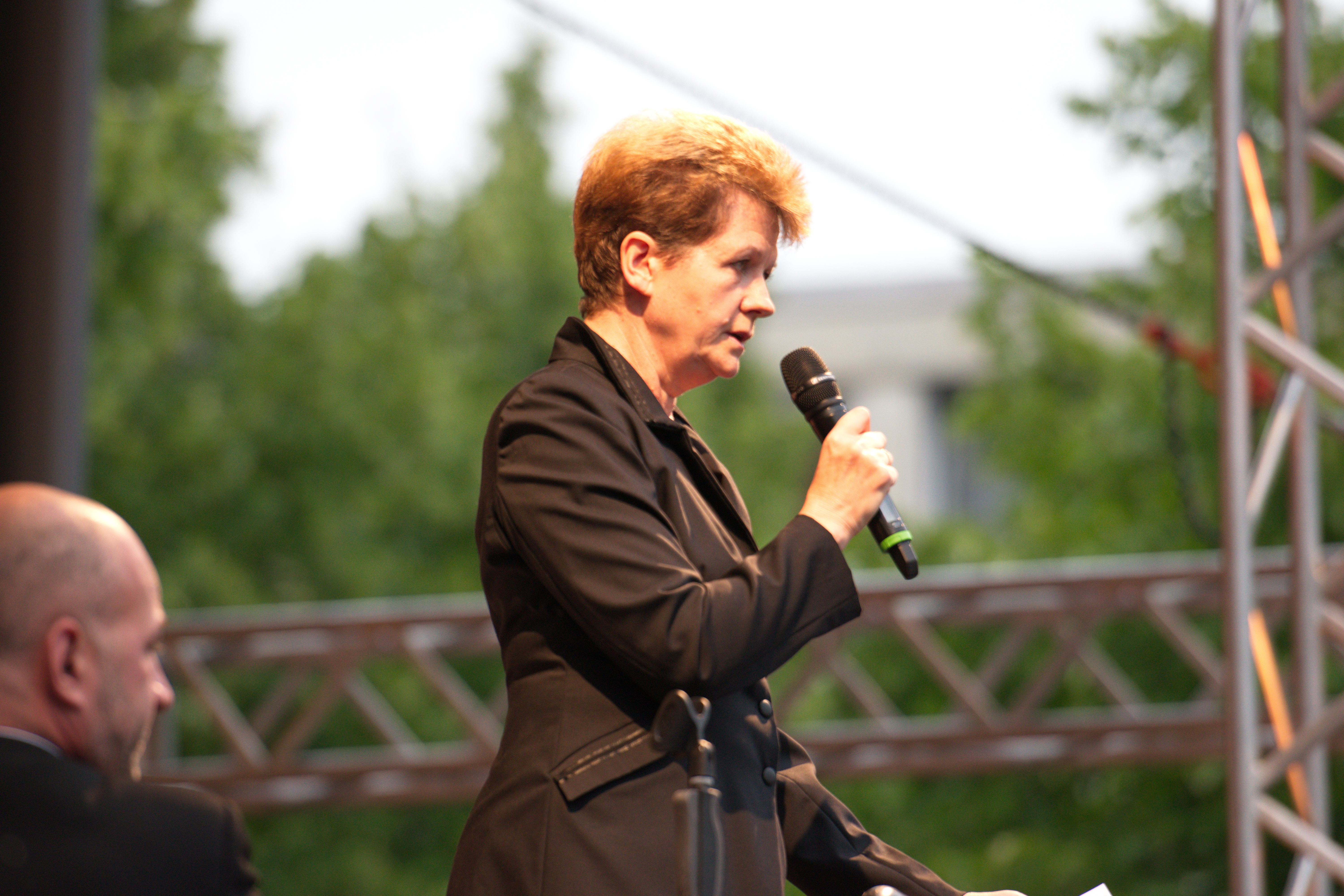 Open-Air-Konzert des Sinfonieorchester Wuppertal am 15. Juli 2017 ab 20:00 auf dem Laurentiusplatz, Wuppertal.